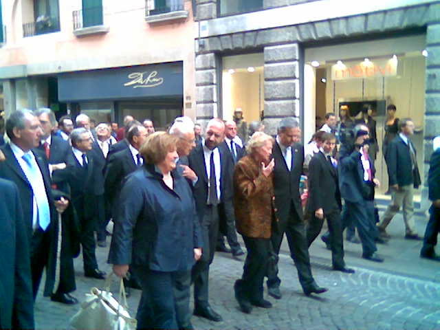 Giorgio Napolitano, Lia Sartori e Achille Variati, a Vicenza nel settembre 2008. Licensing Categoria:Immagini di politici italiani Categoria:Immagini di Giorgio Napolitano